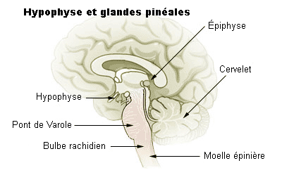 Traduction du document original en anglais